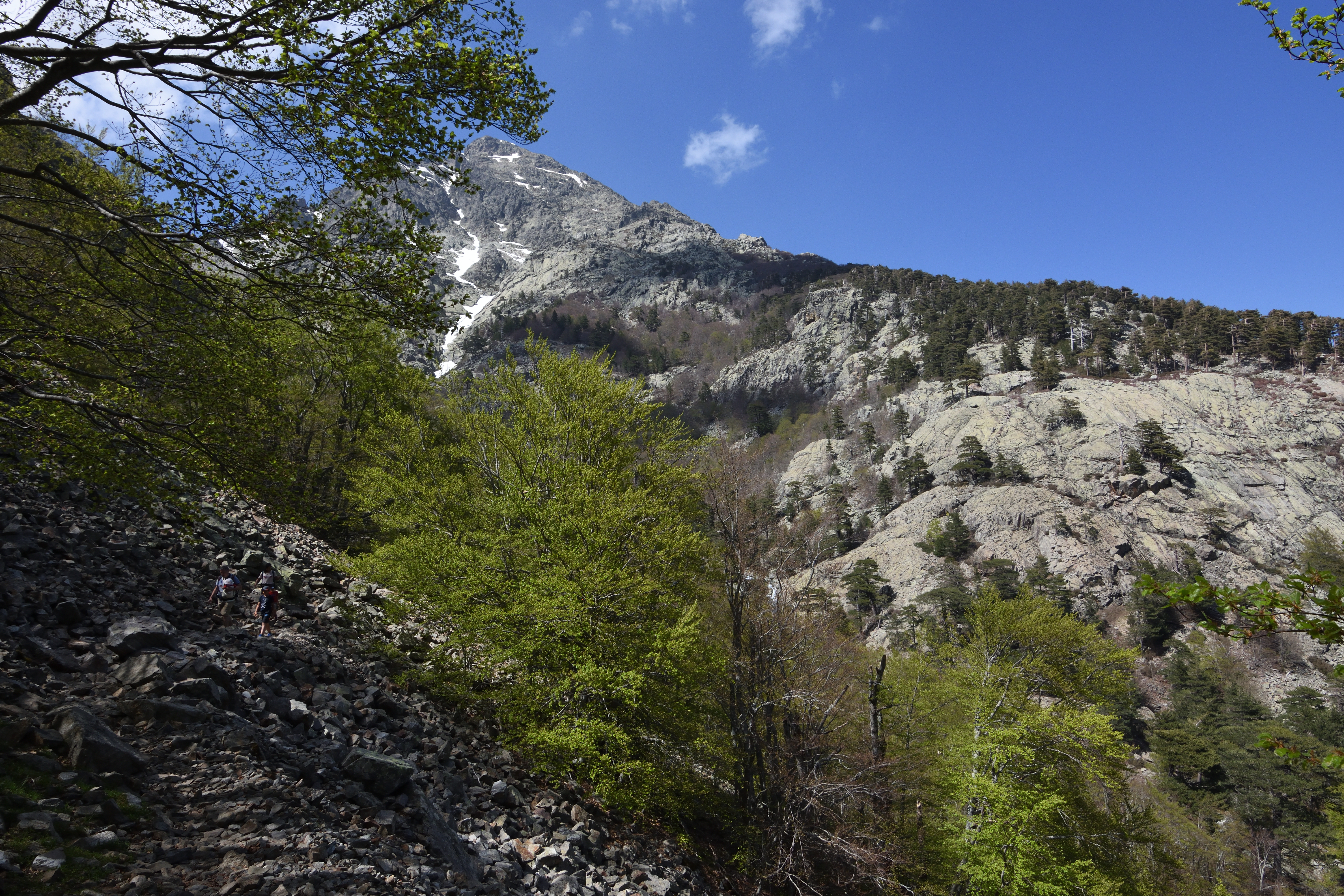 Monte d`Oro vu du sentier vers la Cascade des Anglais en Corse